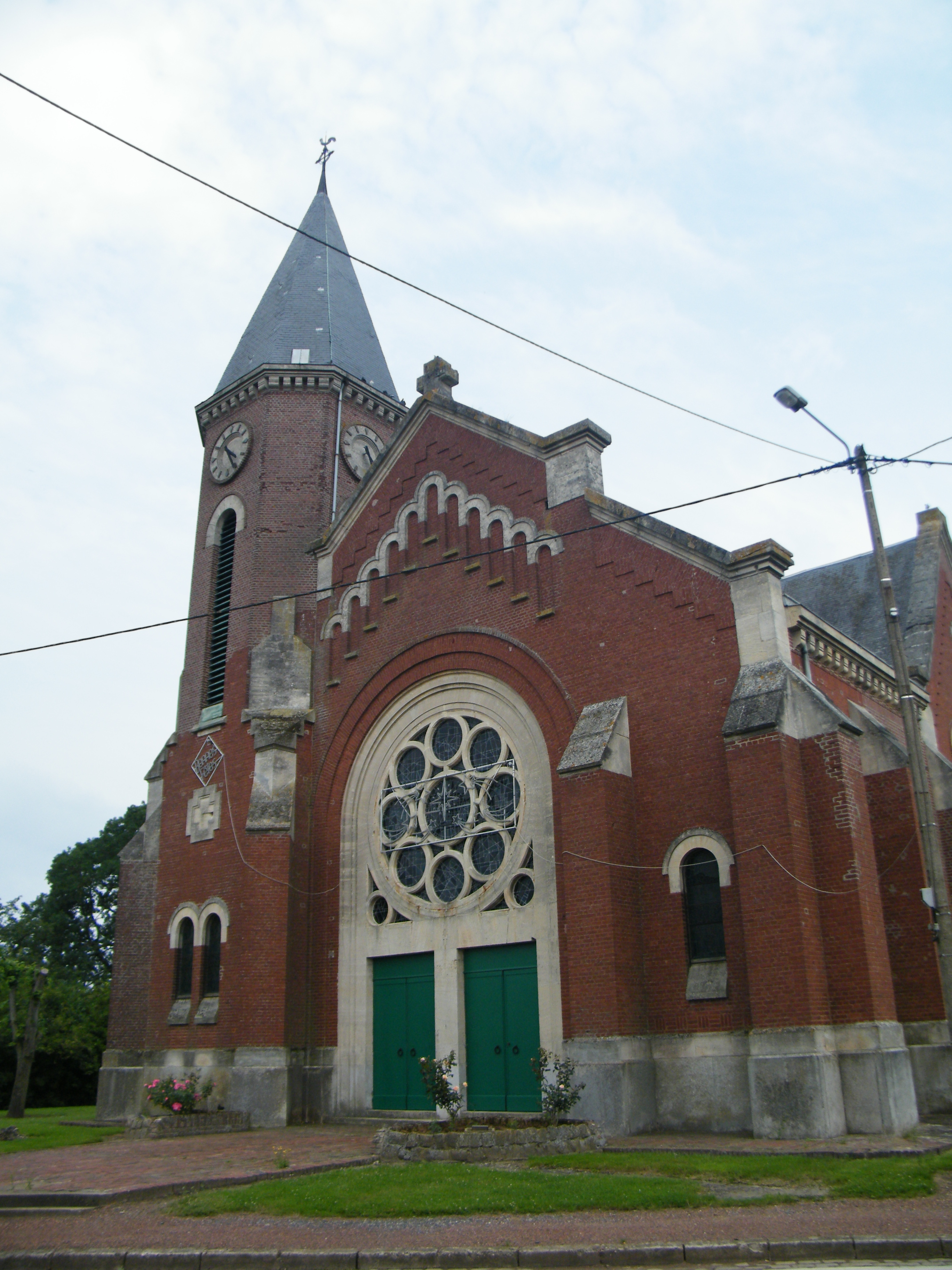 église.